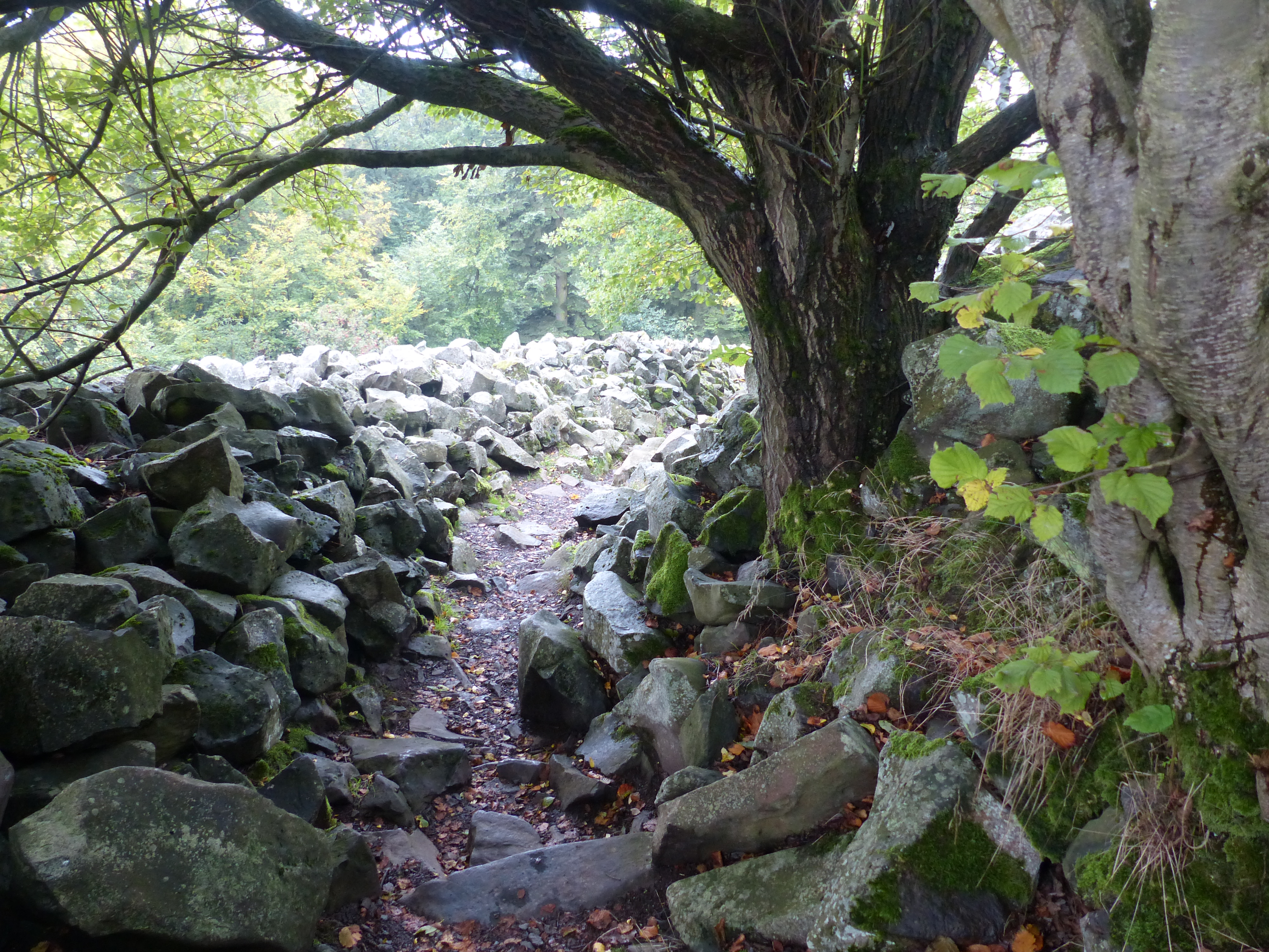 Rauher Kulm